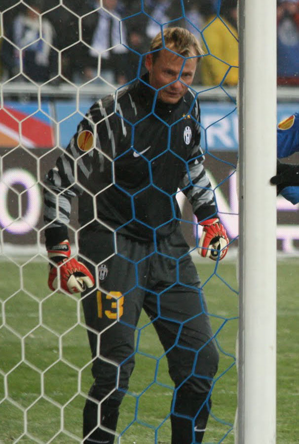 Alexander Manninger difende la porta su un calcio d'angolo, Lech Poznań vs Juventus, UEFA Europa League, 1º dicembre 2010.